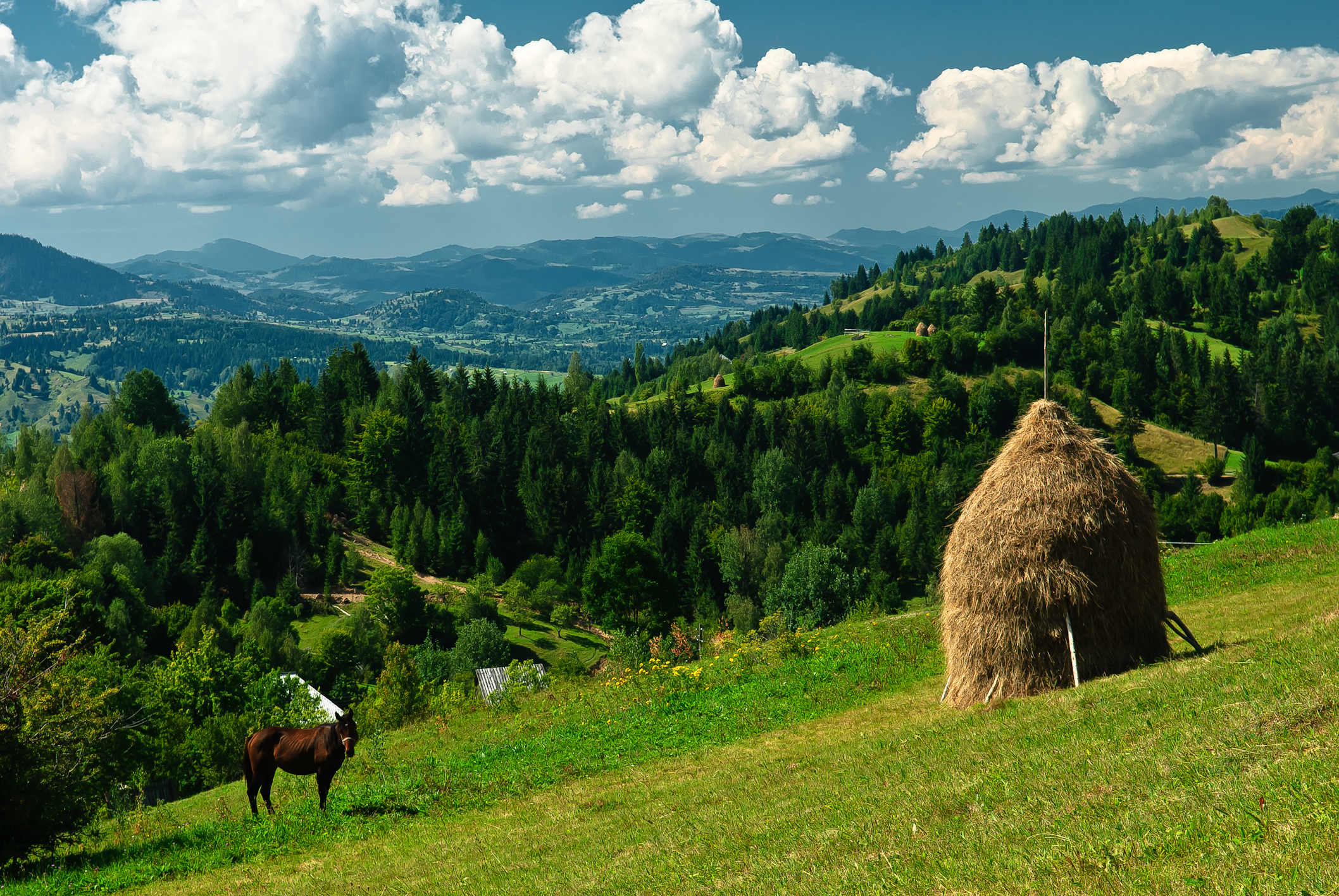 Peisaj de munte.